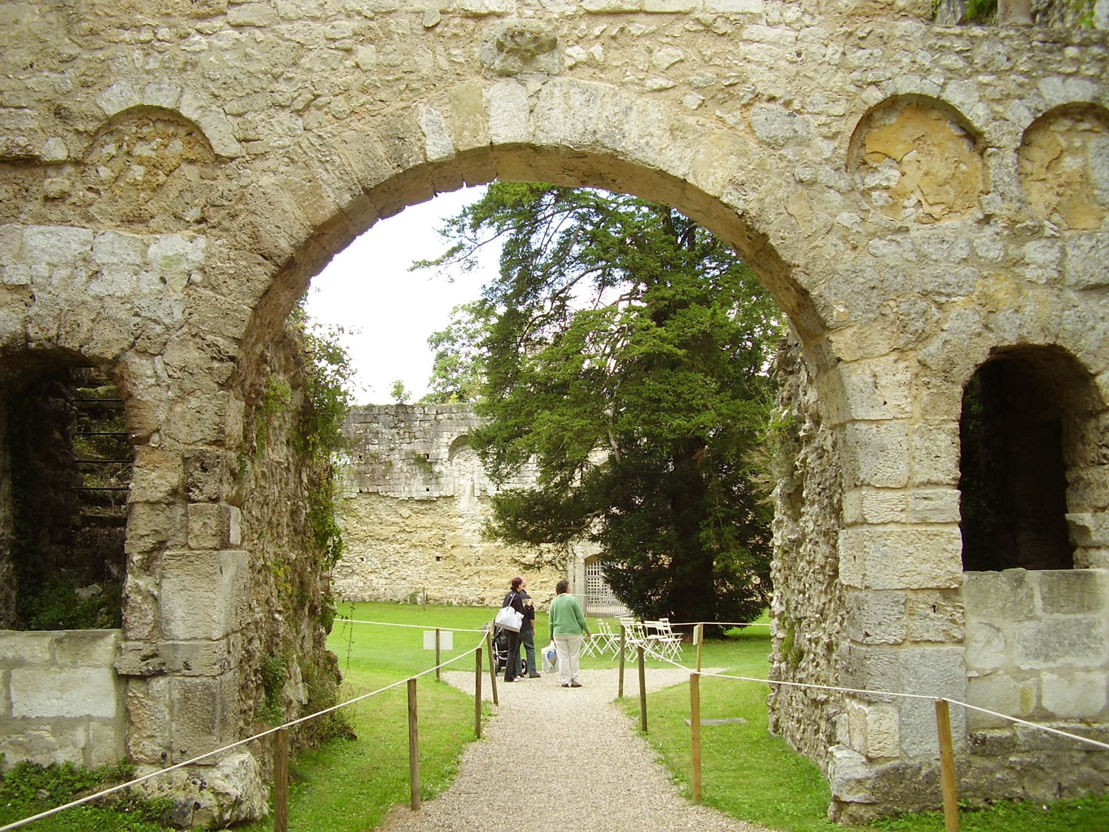 Abbaye de Jumièges, the most beautiful ruins in France